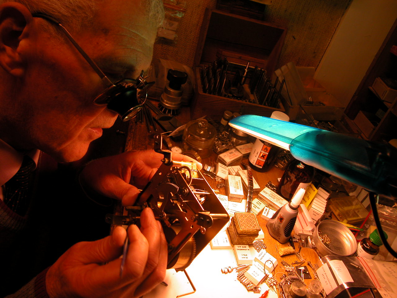 Urmaker